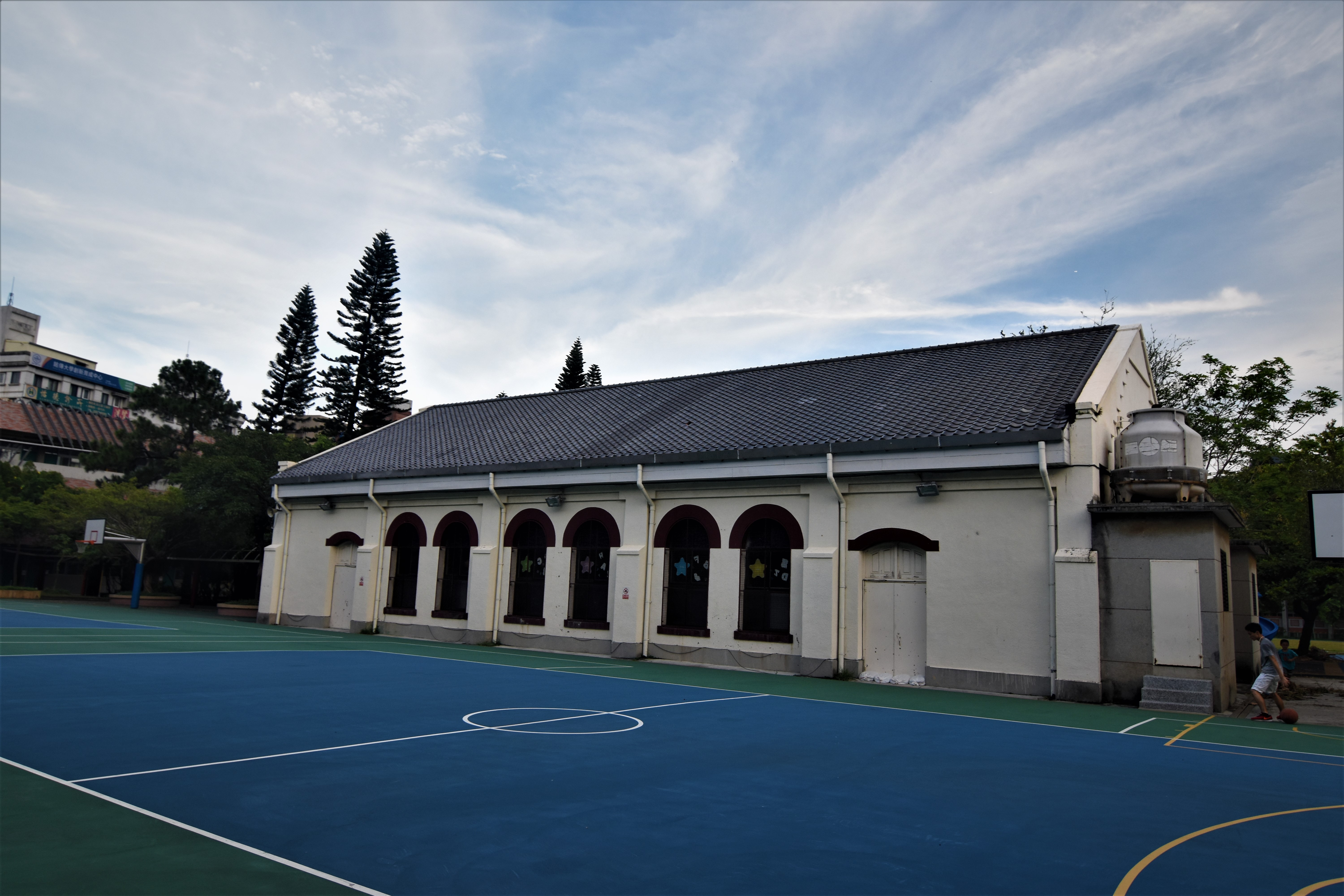 中文（台灣）: 原八芝蘭公學校講堂本建築為興建於大正5年(1916)之磚造校舍，是目前校園內唯一留存之日據時期的建築，見證士林國小百餘年的學校發展歷史，在教育史上具有重要意義。